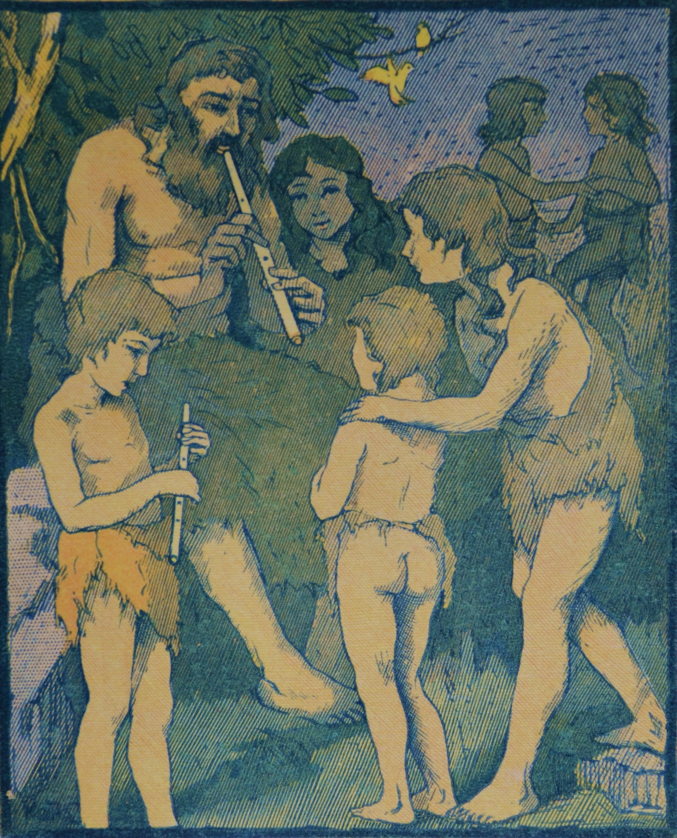 Kotász Károly "Jubál" című színes fametszete